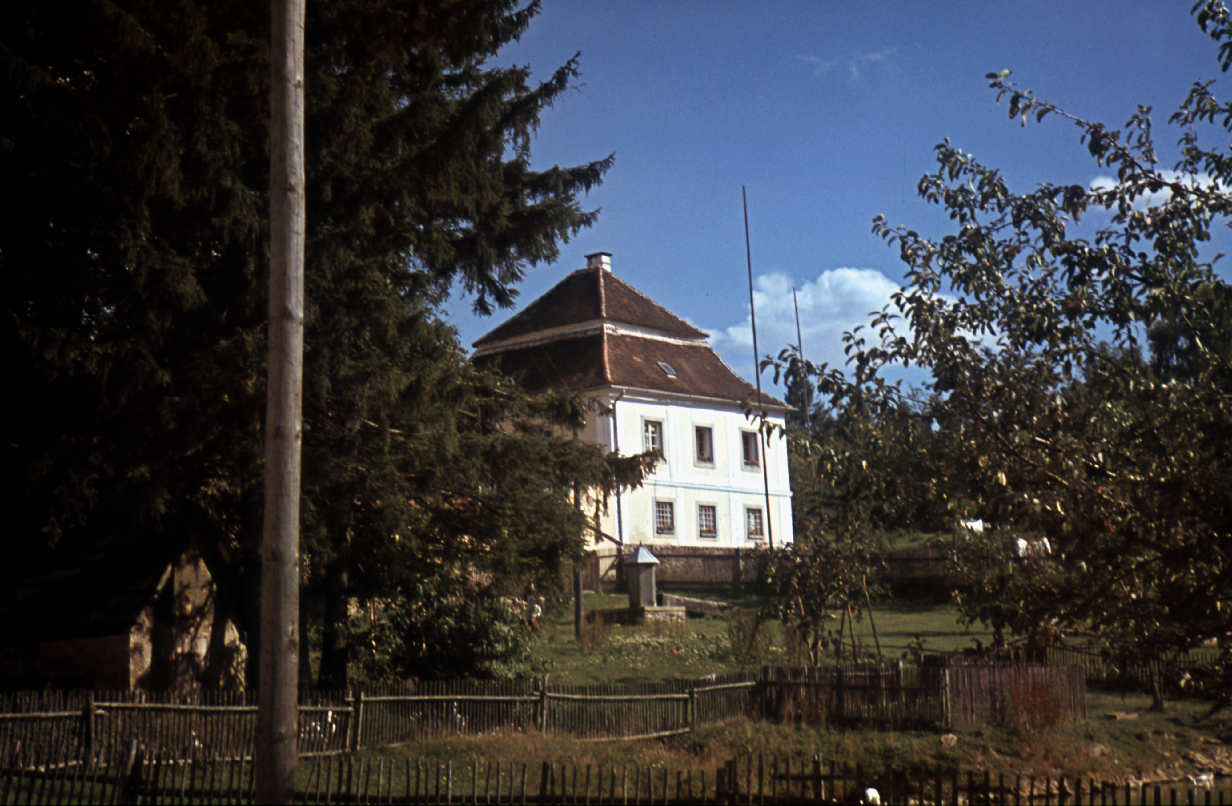 Myslivna na Rozsíčkách, kolem roku 1943, snímek pořízen Mořicem Lobkowiczem, kdy v ní s rodinou pobýval